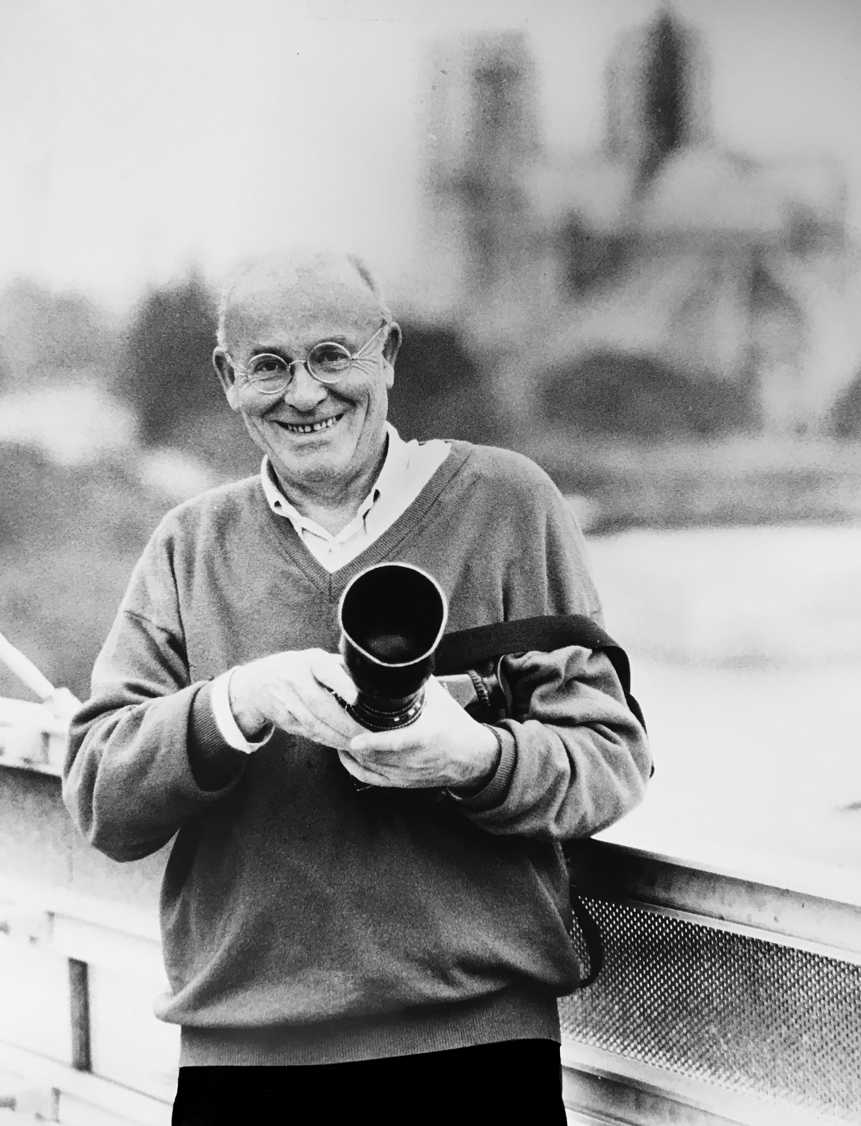 Porträt Hans Eick, Fotograf (1932-2009)